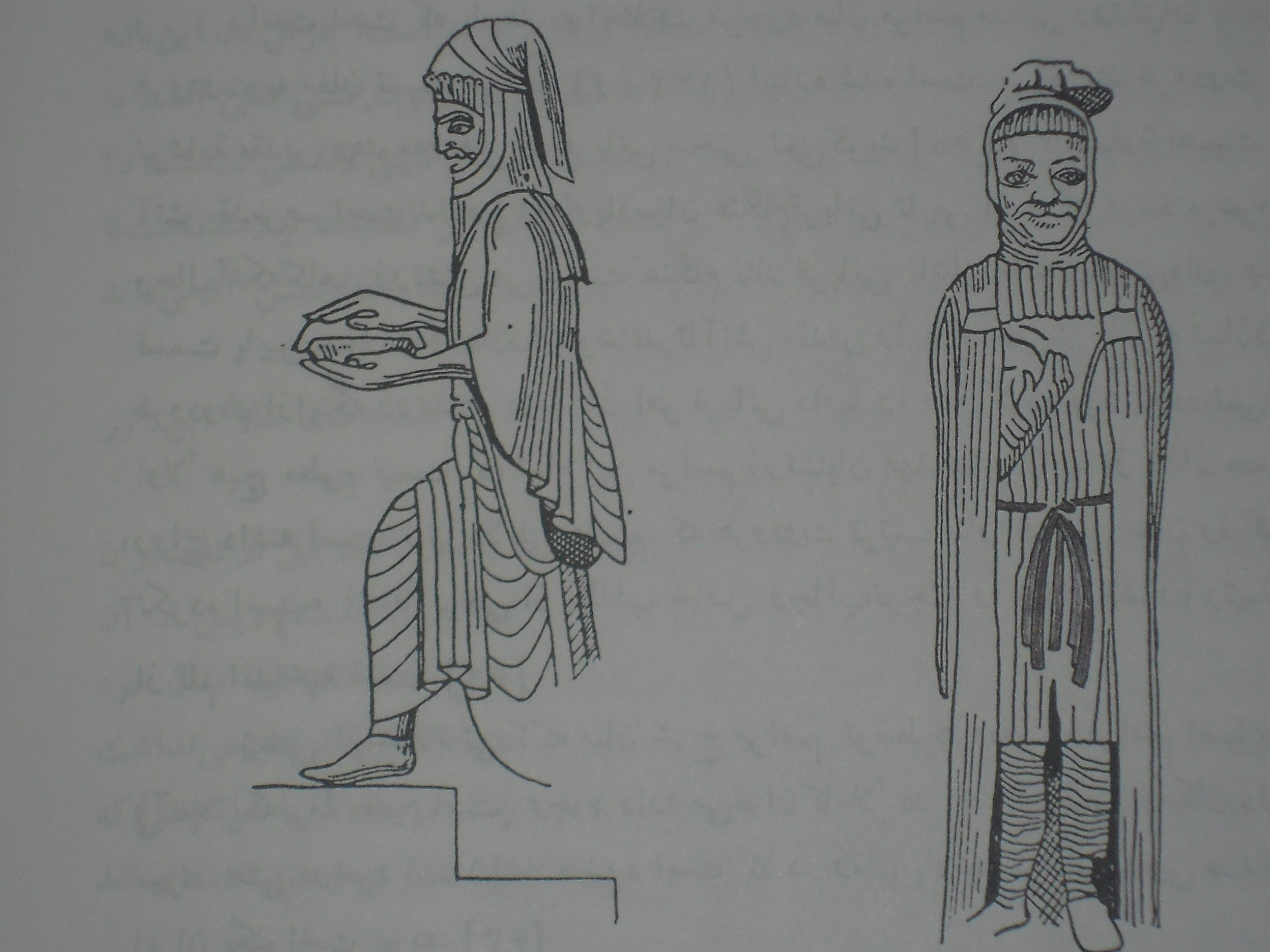 تصویر از روبرو: مغ با ظرفی از نوشابه هوم (هئومه). تصویر نیم‌رخ: مجسمهٔ کوچک مغ از نقره. آنچه اصطلاحاً « گنجینهٔ آمودریا » نامیده می‌شود.